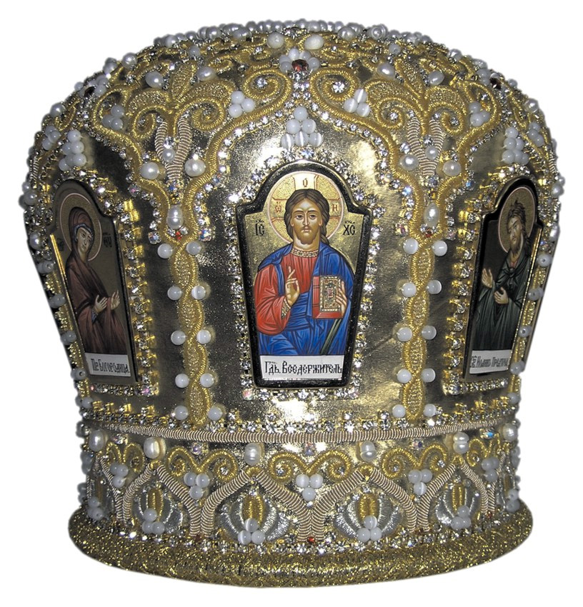 Митра иерейская. Фон - ткань золотого цвета с "металлическим" эффектом. Золотое шитьё канителью. Ручная вышивка металлической и шёлковой нитью. Иконы - дерево, левкас, темпера, творёное золото. Изображены образы избранных святых - всего восемь икон. Вся работа отделана натуральным жемчугом, поделочными камнями и стразами.